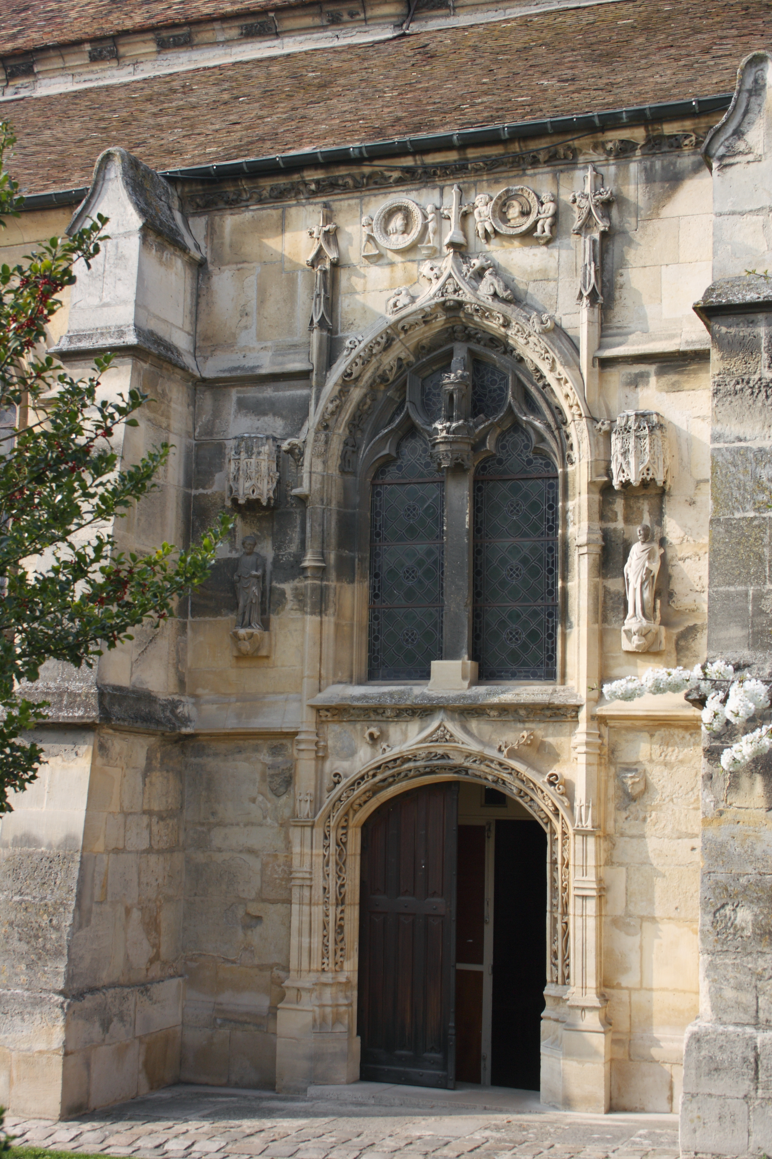 Kirche Saint-Pierre-et-Saint-Paul in Sarcelles